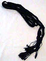 Photograph of a black "Gartel" from Wikipedia originally uploaded by user:Noogster under the Creative Commons Attribution-ShareAlike 3.0 License.